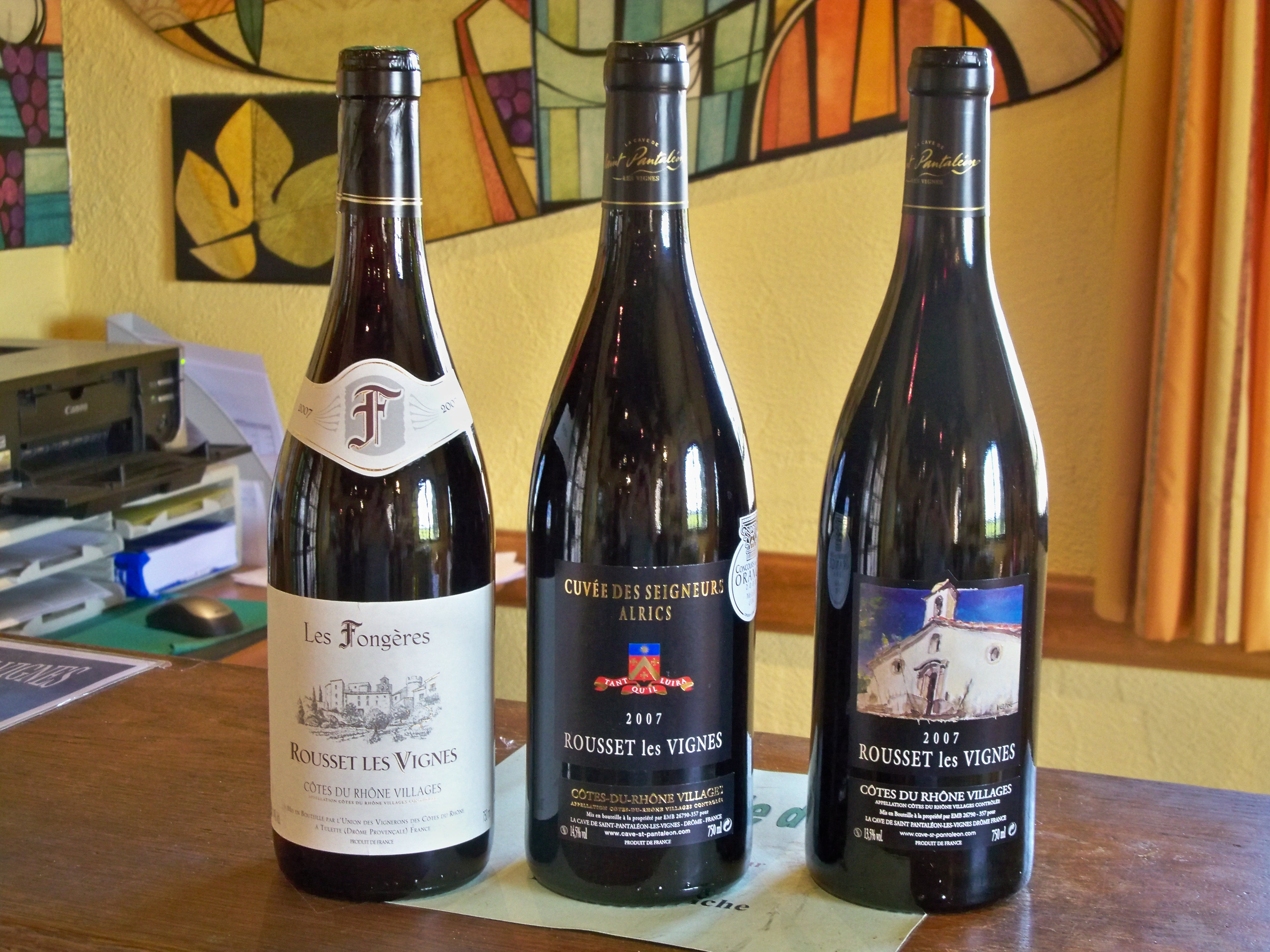 Bouteilles de Rousset des Vignes, Drôme, France